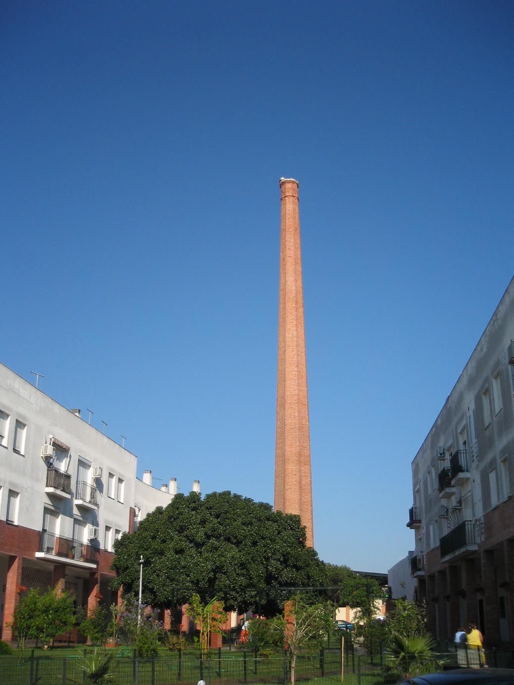 Chimenea de la antigua fábrica de alcohol vínico en Sanlúcar de Barrameda, que fue propiedad de Esteban Bozzano